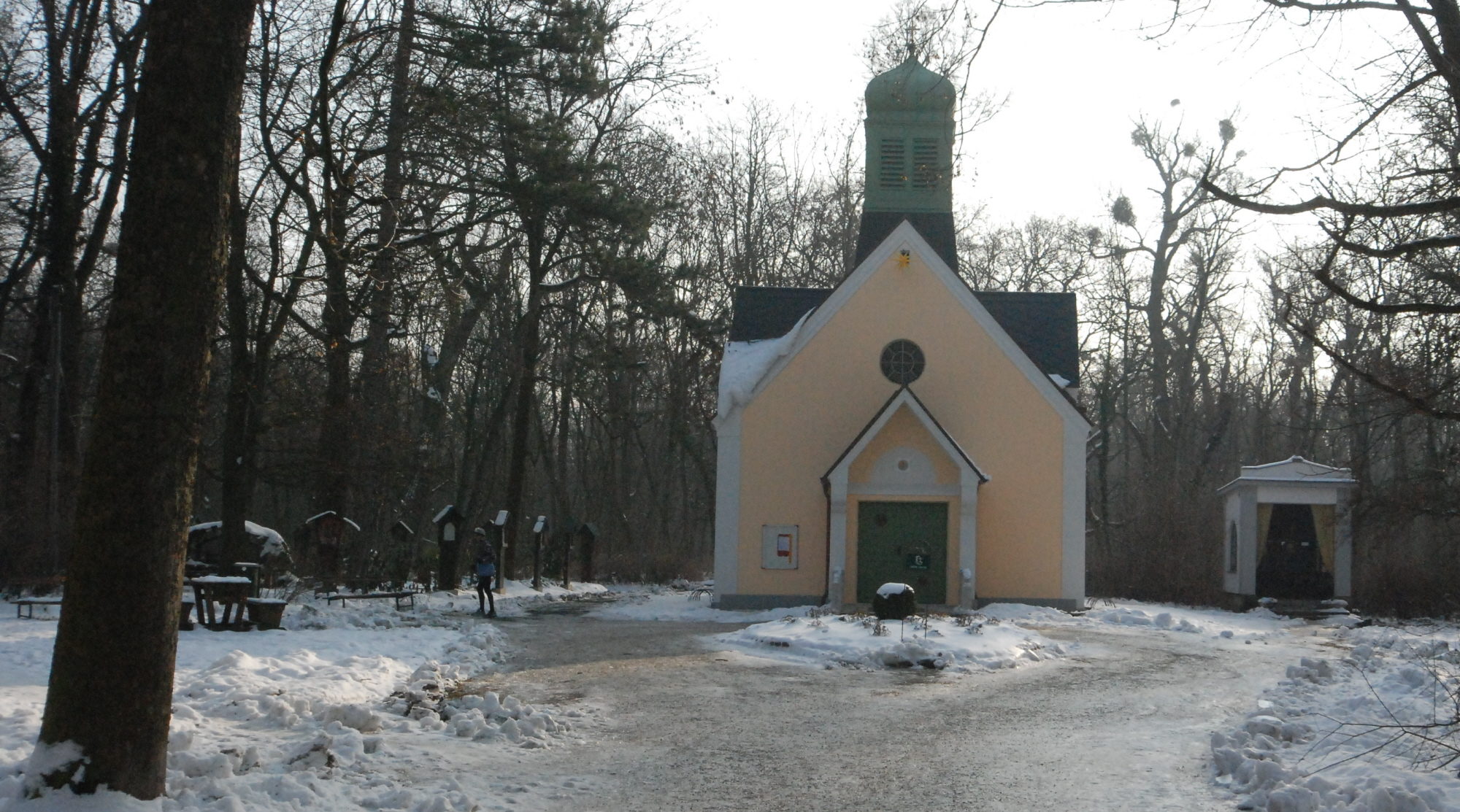 Wallfahrtskirche Maria Grün im Wiener Prater